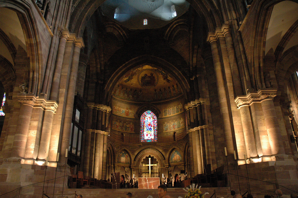 best viewed large